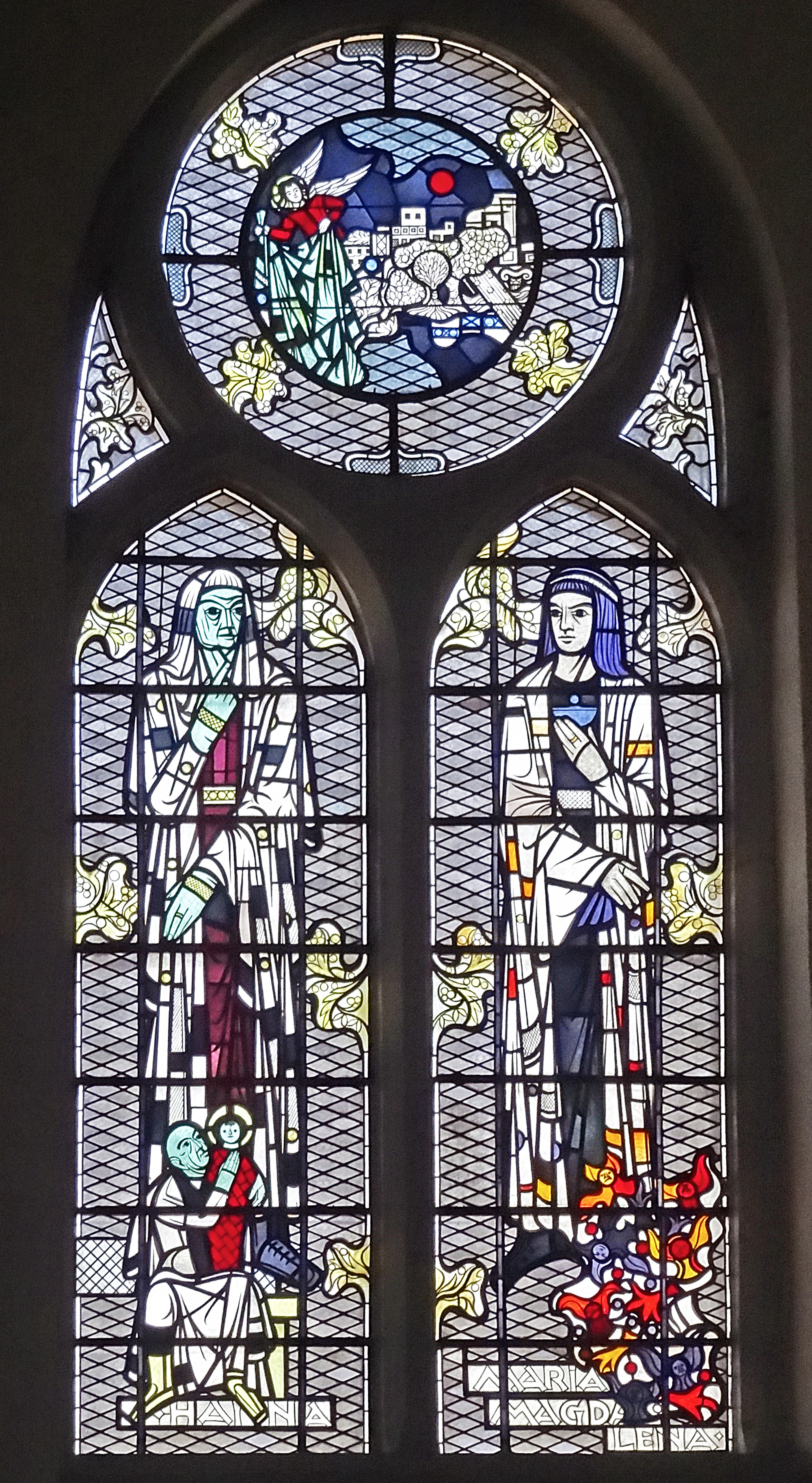 Ostfenster I von Karl Völker in der Thomaskirche zu Erfurt